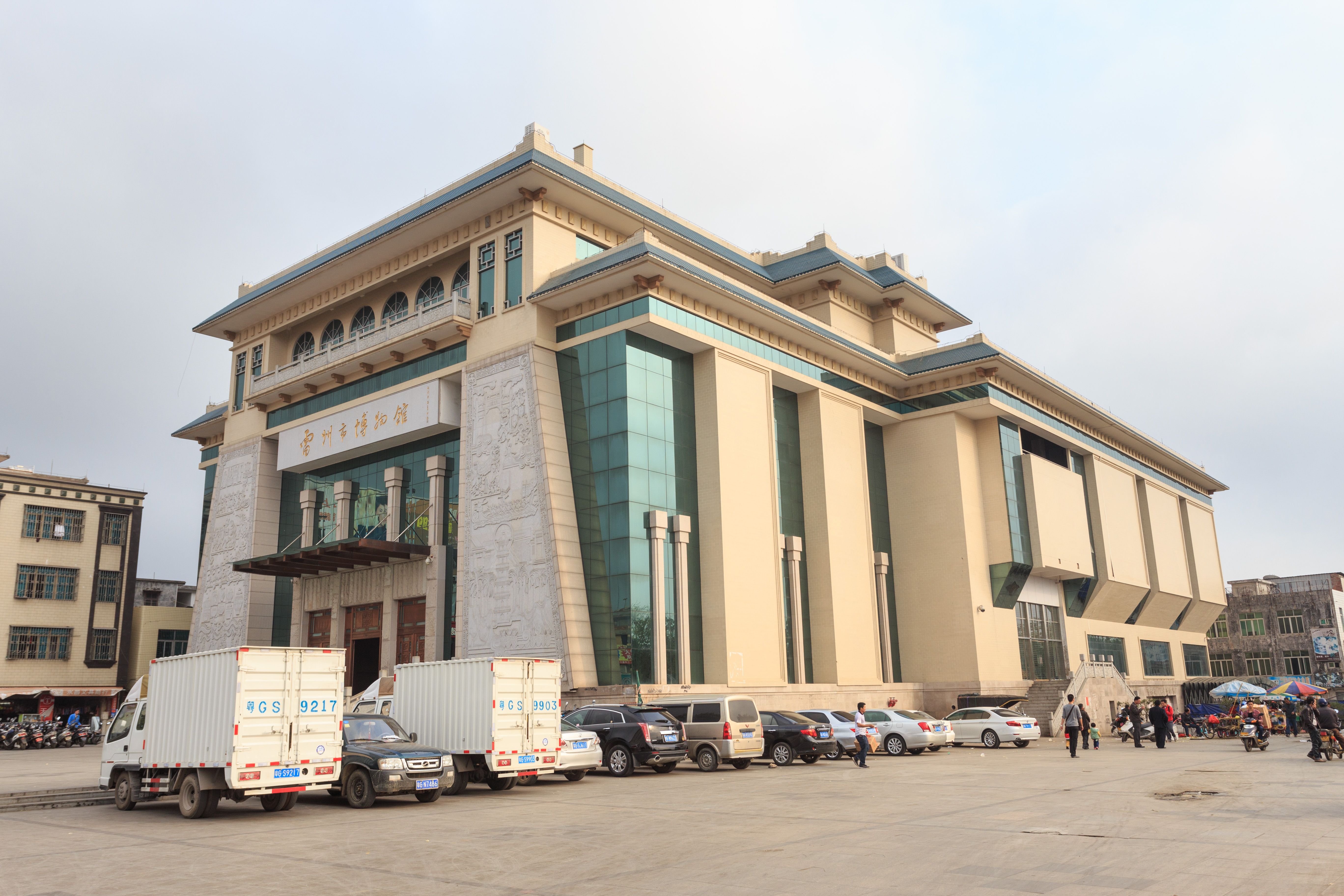 雷州市博物馆 西北面